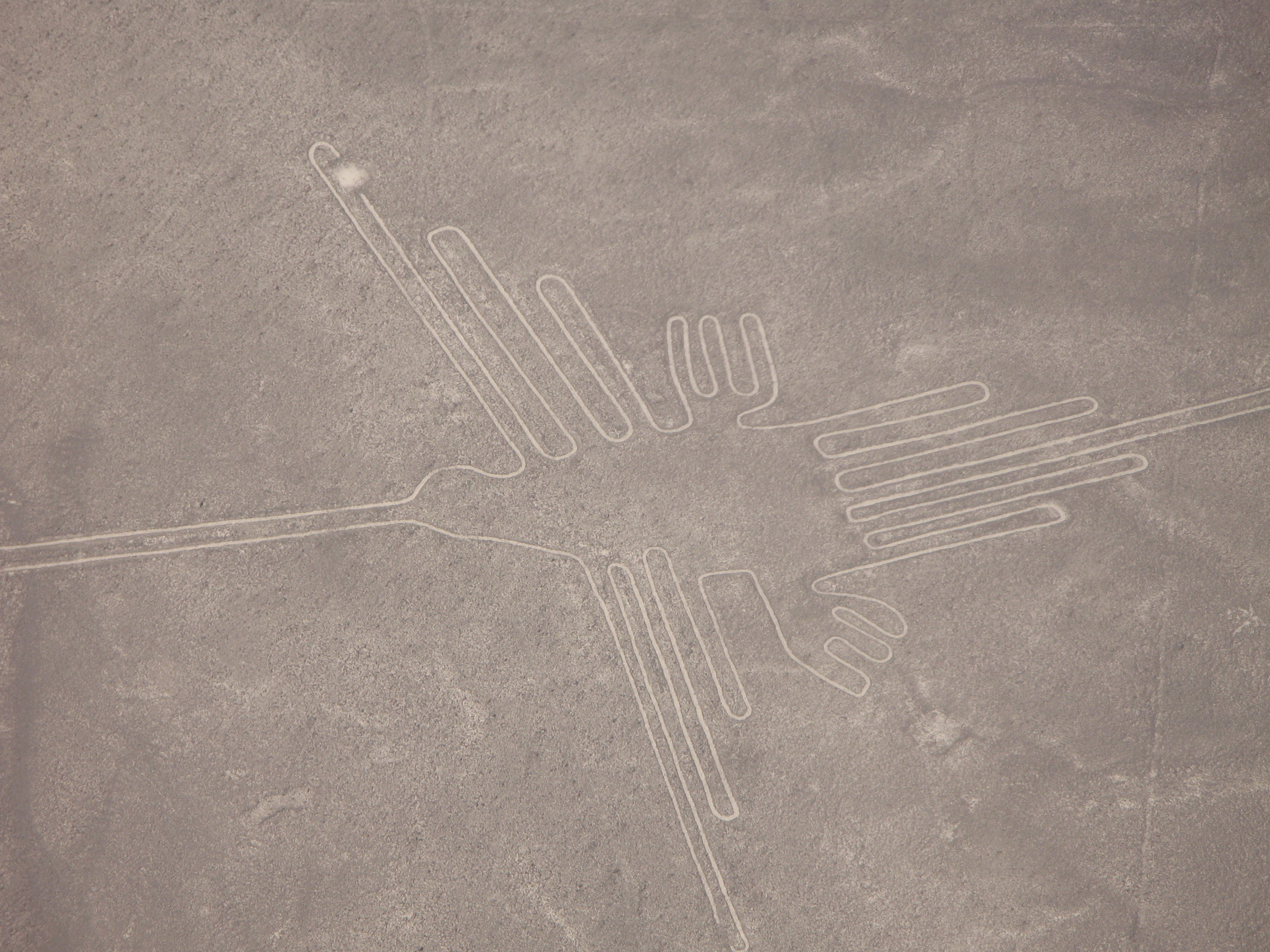 Nazca črte - kolibri